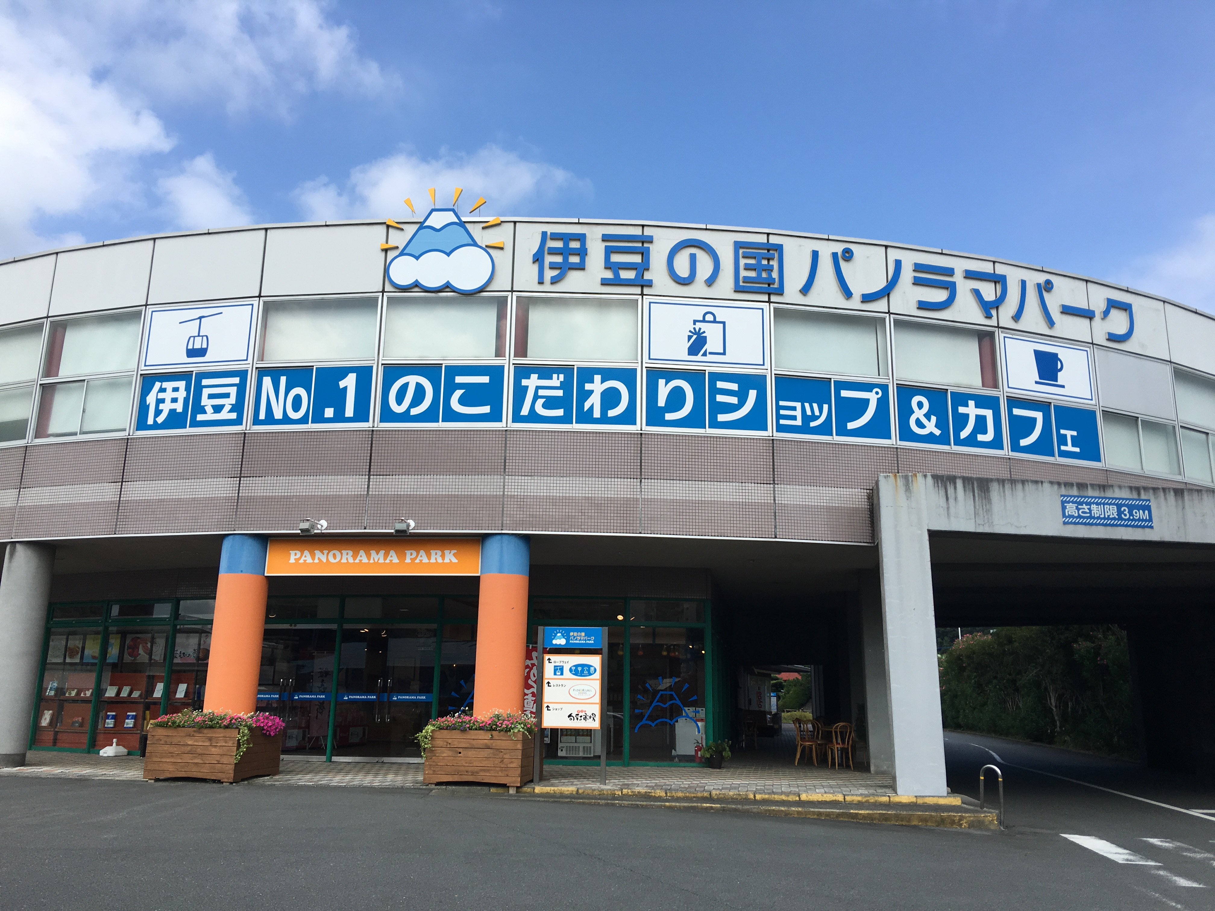 伊豆の国パノラマパークの山麓正面入り口